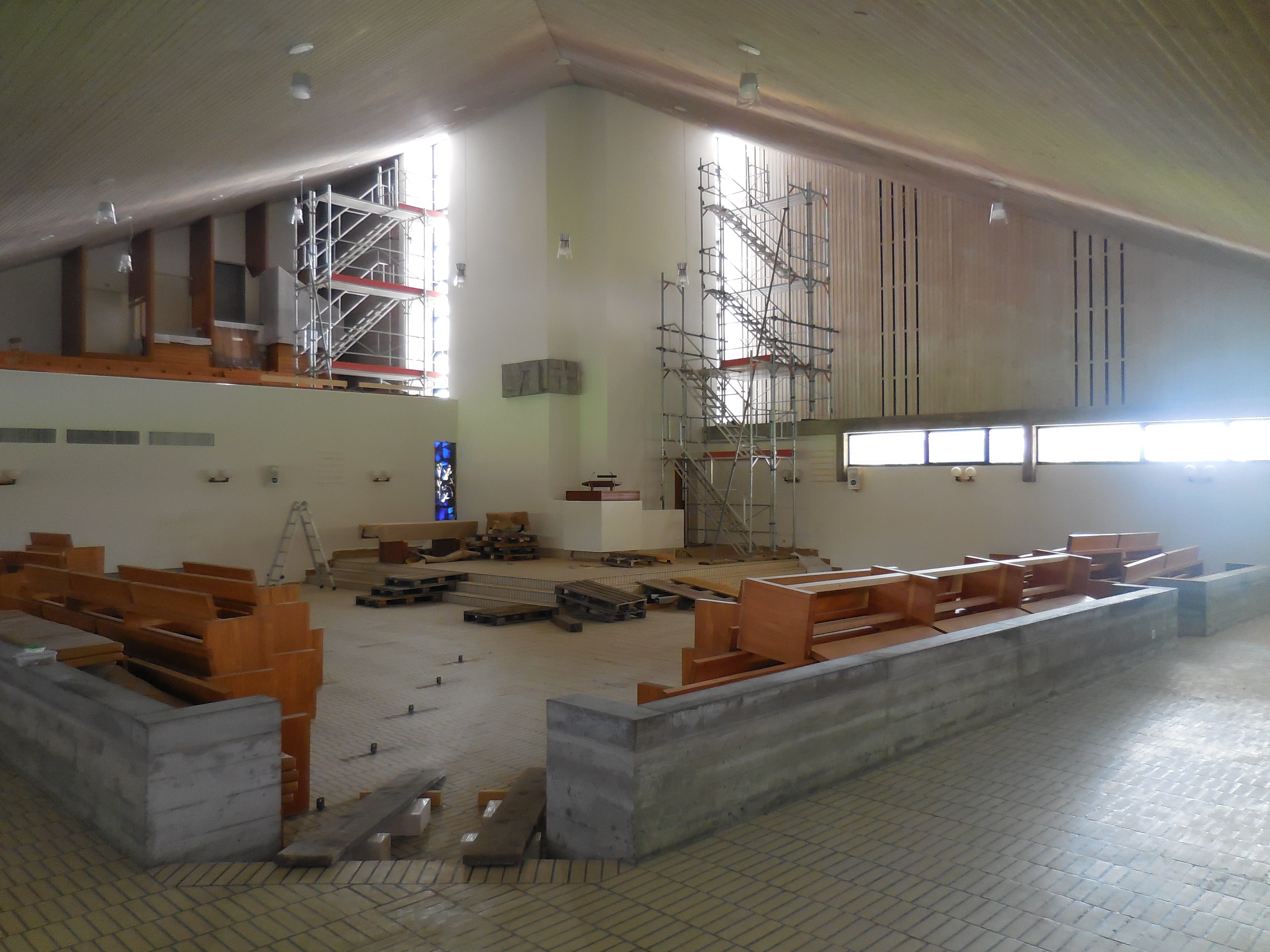 Innenraum der reformierten Kirche Glashütten während der Totalrenovation von 2014